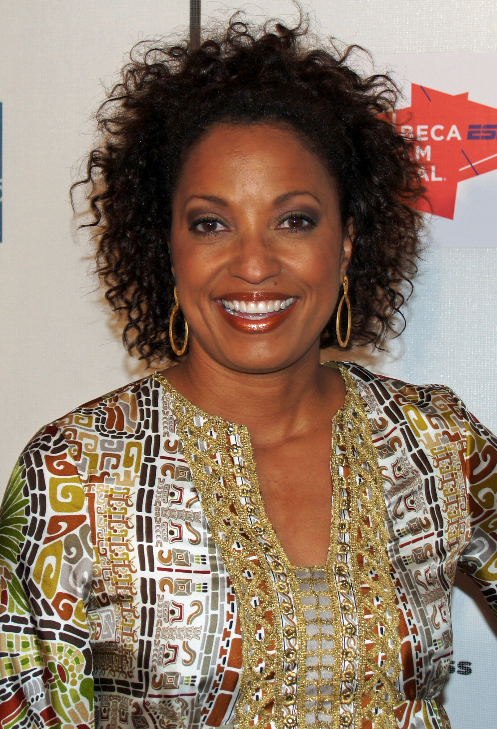 Rene Syler